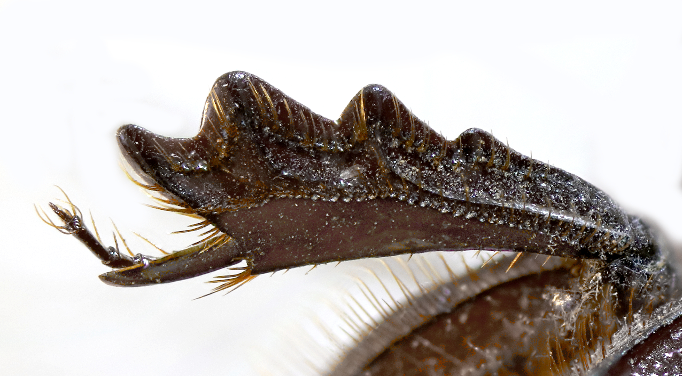 Copris lunaris rechte Vorderschiene von oben, Außenseite mit vier Zähnen